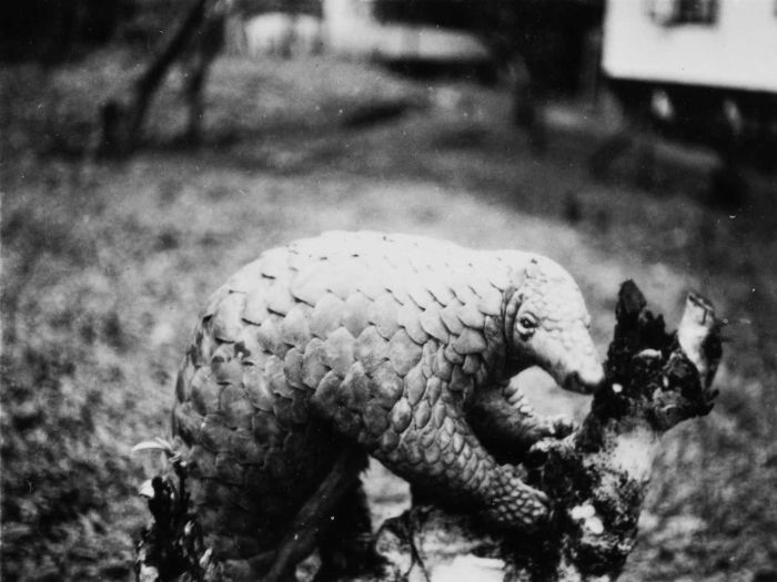 Foto. Een Javaans schubdier (Manis javanica)